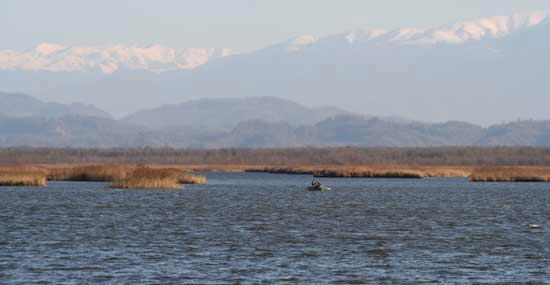 პალიასტომის ტბა